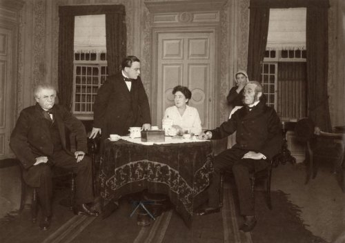 Een scène uit het toneelstuk "Martin Jacobi's Remedie" door toneelgezelschap het Rotterdamsch Tooneel met Helmert Cremer, Jules Verstraete, Alida Tartaud-Klein en Folkert Kramer. Huiskamerscène met drie mannen en een vrouw rond een tafel en een geschrokken dienstmeisje erachter.